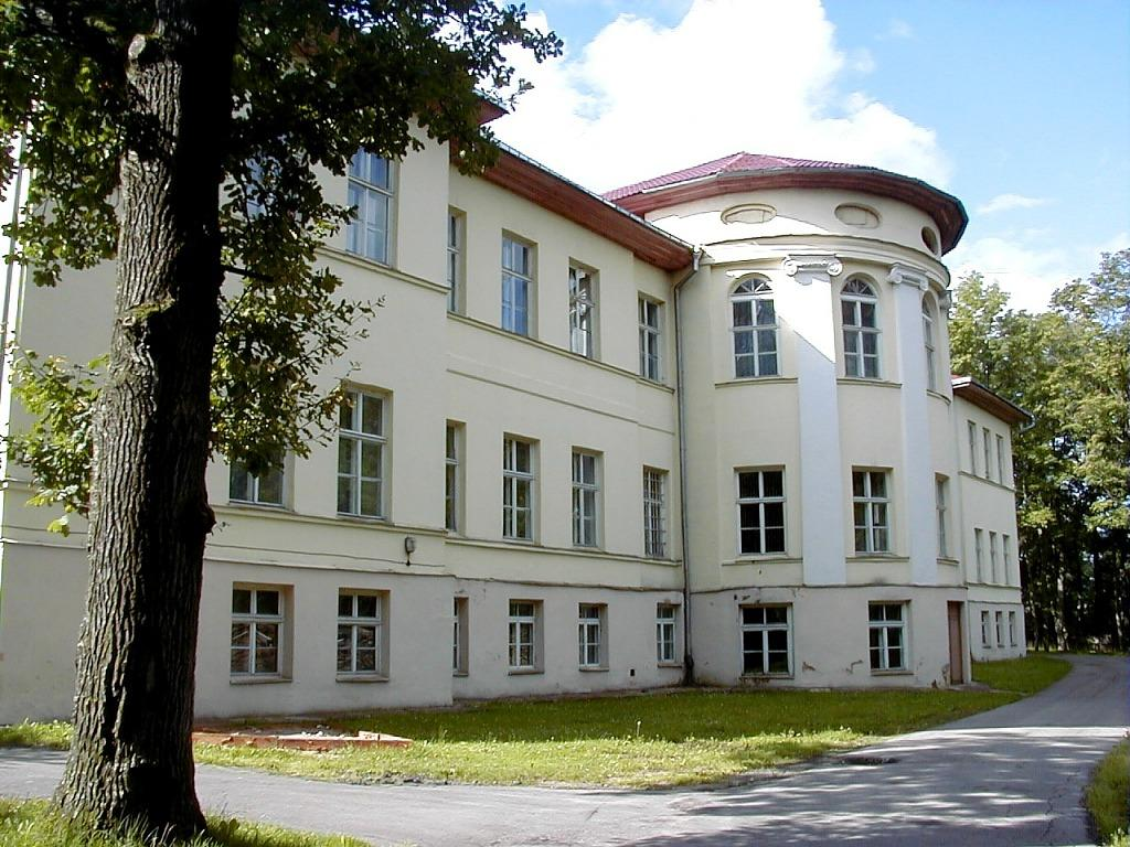 Balvu pils 2000-07-28